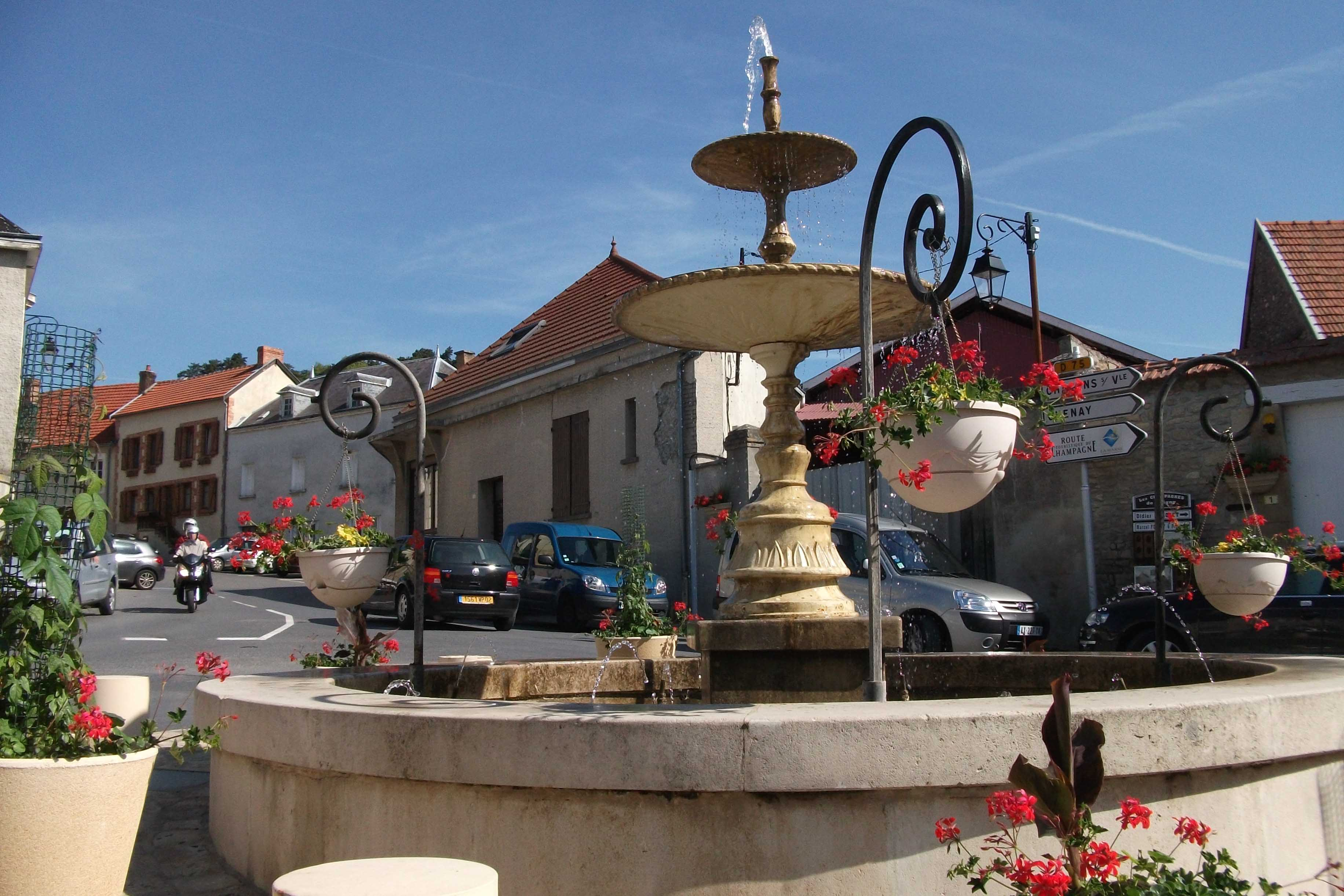 Fontaine sur la place dans le village de Trigny (Marne).